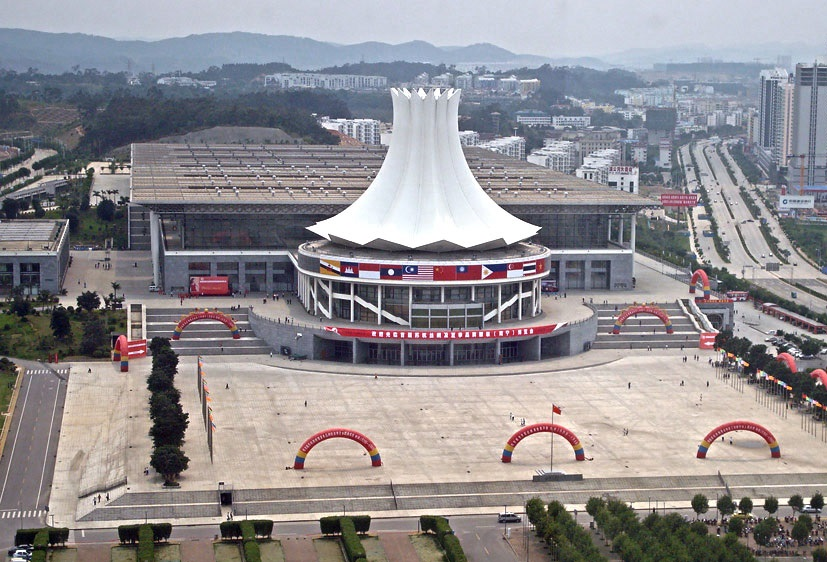 南宁国际会展中心鸟瞰图